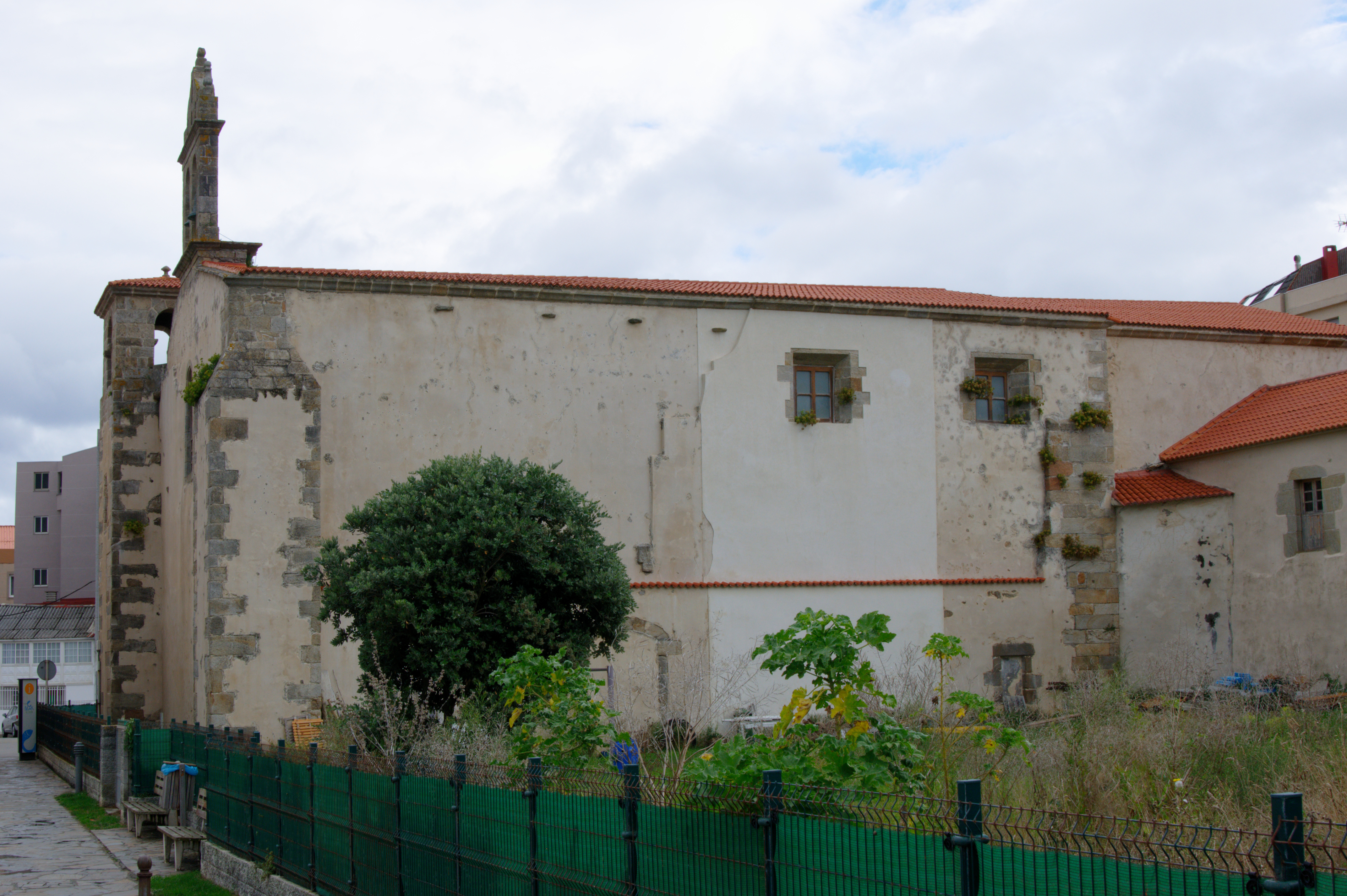 Caión, Convento de los Agustinos